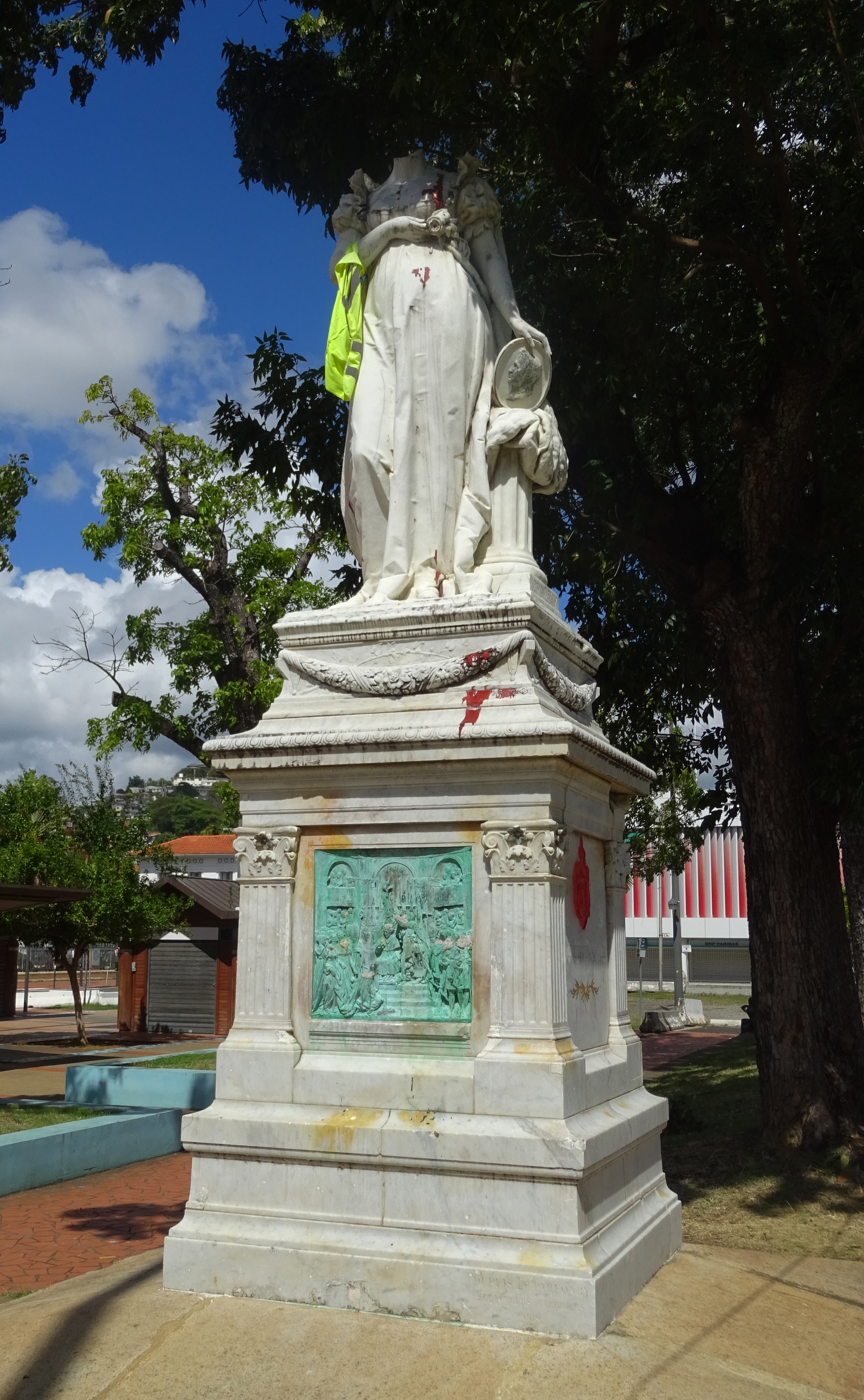 Statue der Joséphine in der Parkanlage „La Savane“, Fort-de-France, Martinique. Am rechten Arm trägt die 1991 geköpfte Statue der Kaiserin eine Gelbweste.